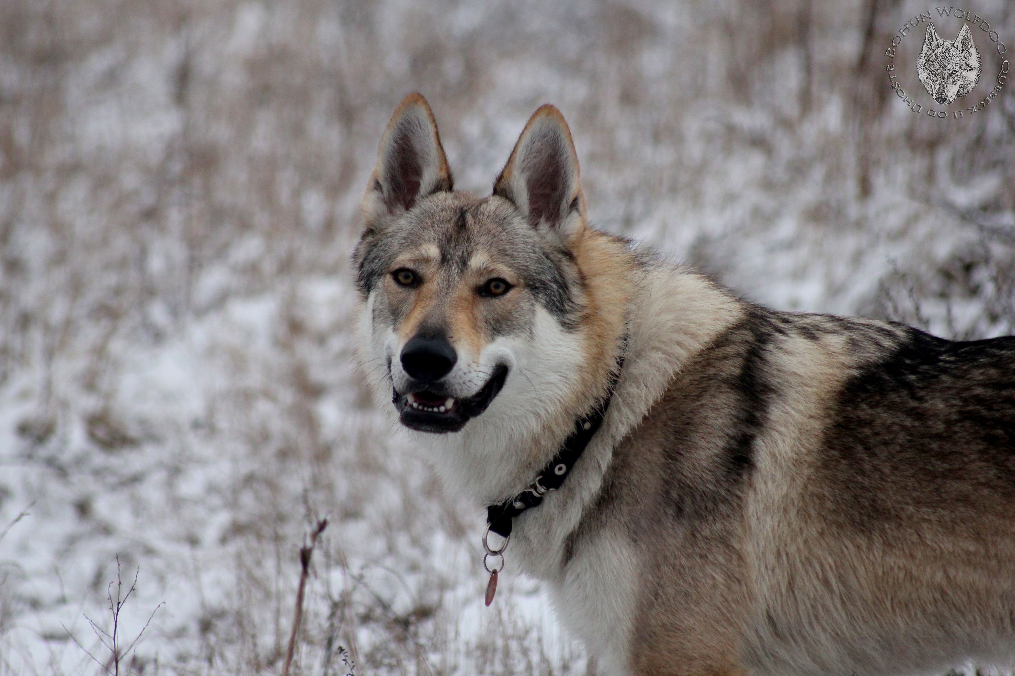 Czechosłowacki Wilczak Quebeck II od Úhoště (Bohun) Československý vlčák